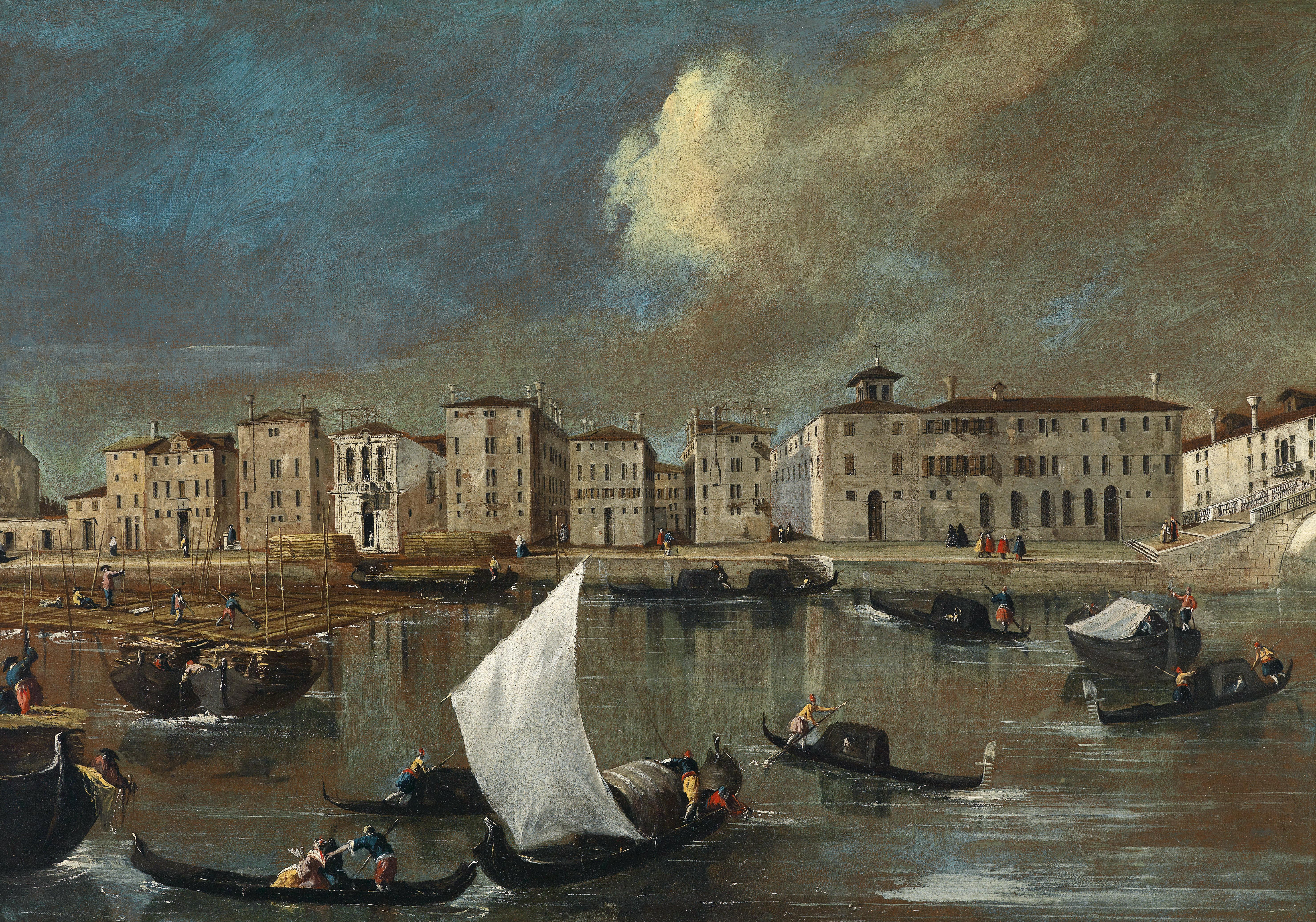 Venedig, Ansicht des Fondamenta Nuove von der Insel San Michele mit dem Ospedale und der Kirche di San Lazzaro dei Mendicanti sowie dem Canale Fondamento Nuovo und der Ponte dei Mendicanti